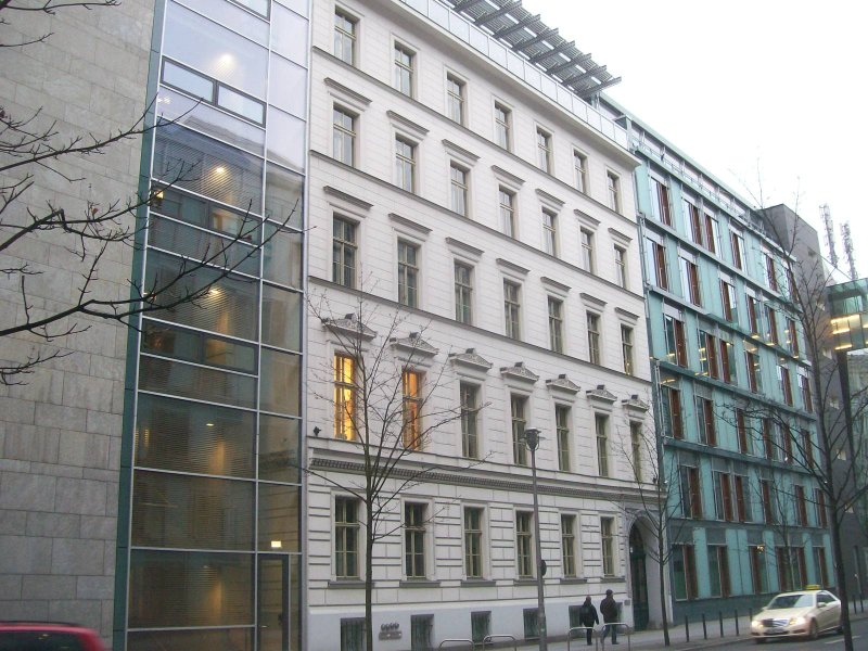 Gebäude in Berlin, in dem die Chemische Gesellschaft der DDR ihre Geschäftsstelle unterhielt.